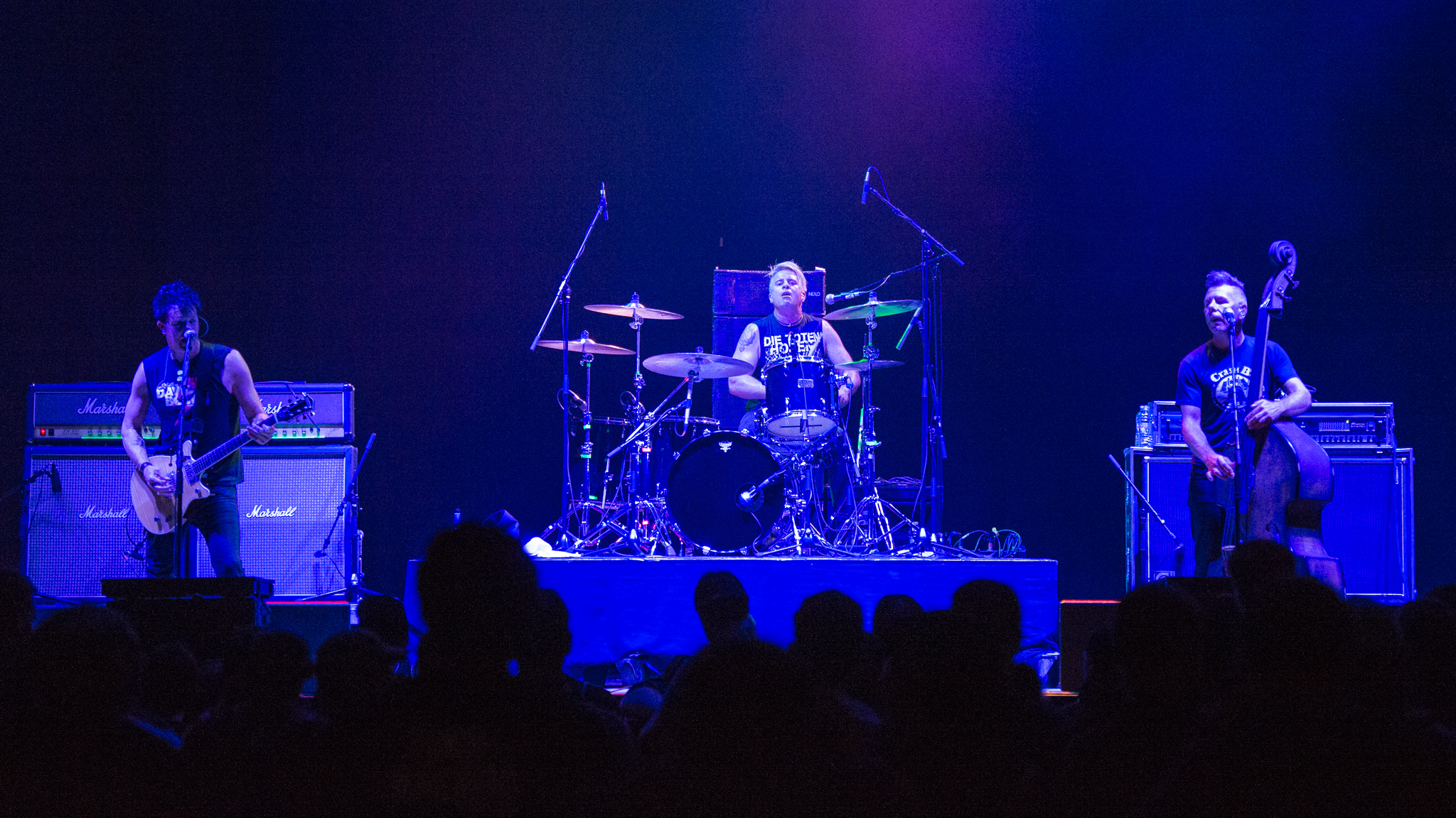 ARGO-Konzerte,Andy Strachan,Arena Nürnberger Versicherungen,Chris Cheney,Engelbert Strauss Alternarena,Konzert,Livekonzert,Livemusik,Musik,RiP,Rock im Park 2017,Scott Owen,The Living End